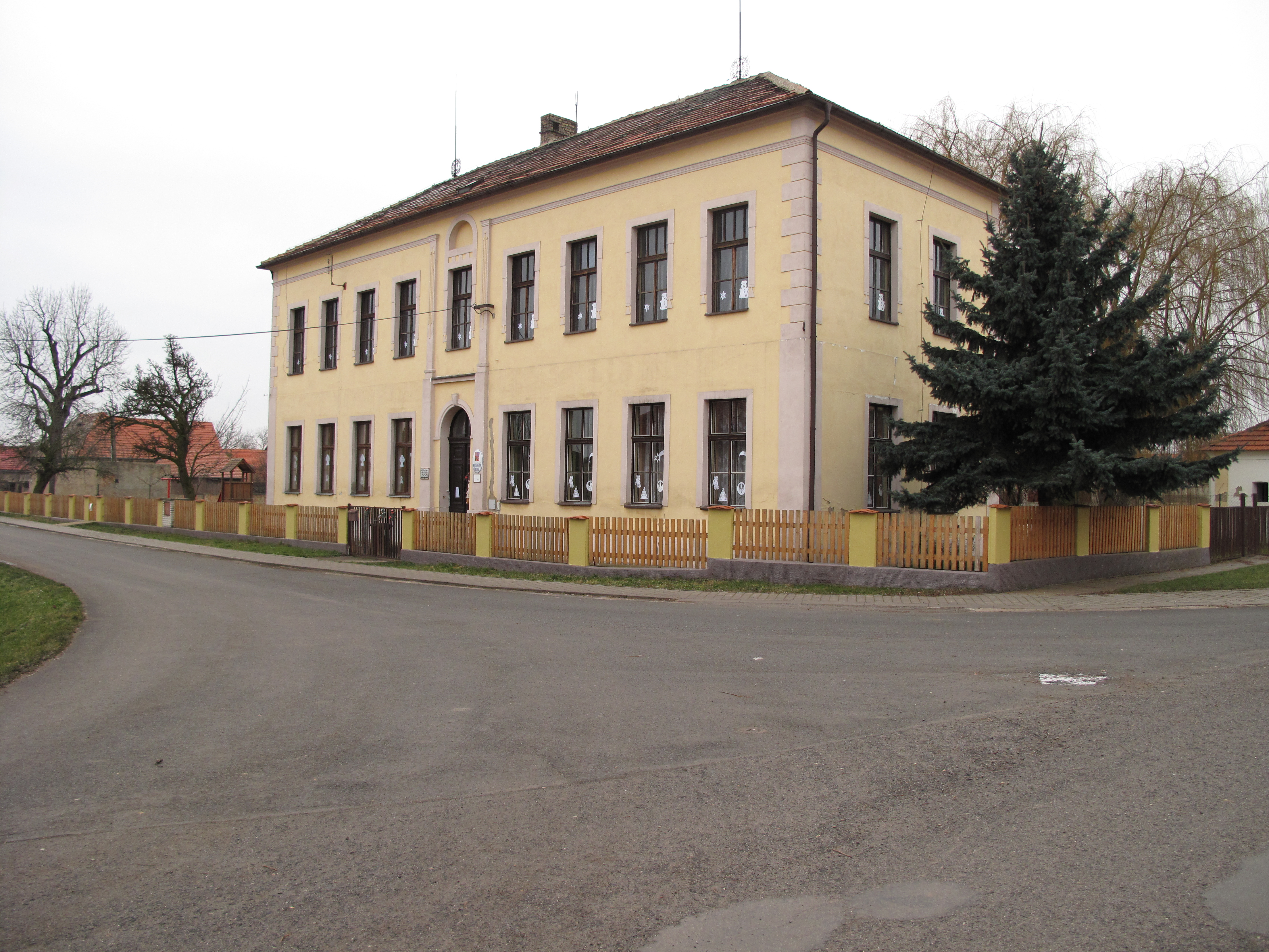 Škola v Podsedicích. Okres Litoměřice, Česká republika.